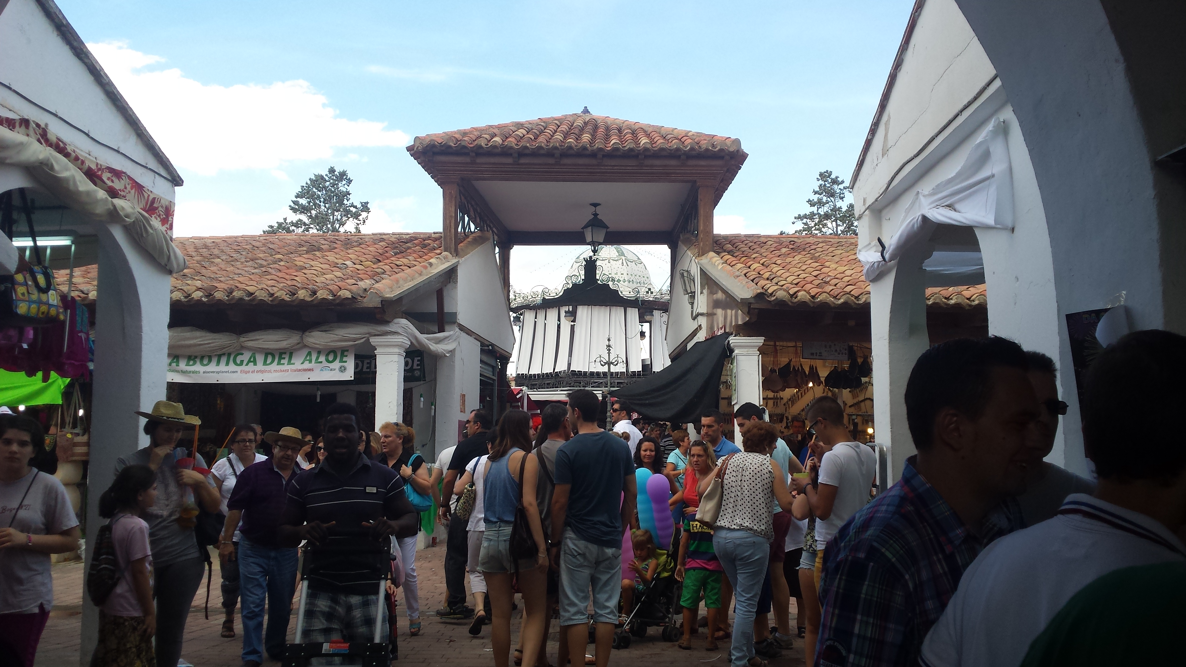 Recinto Ferial de Albacete. Templete de la Feria. Feria de Albacete